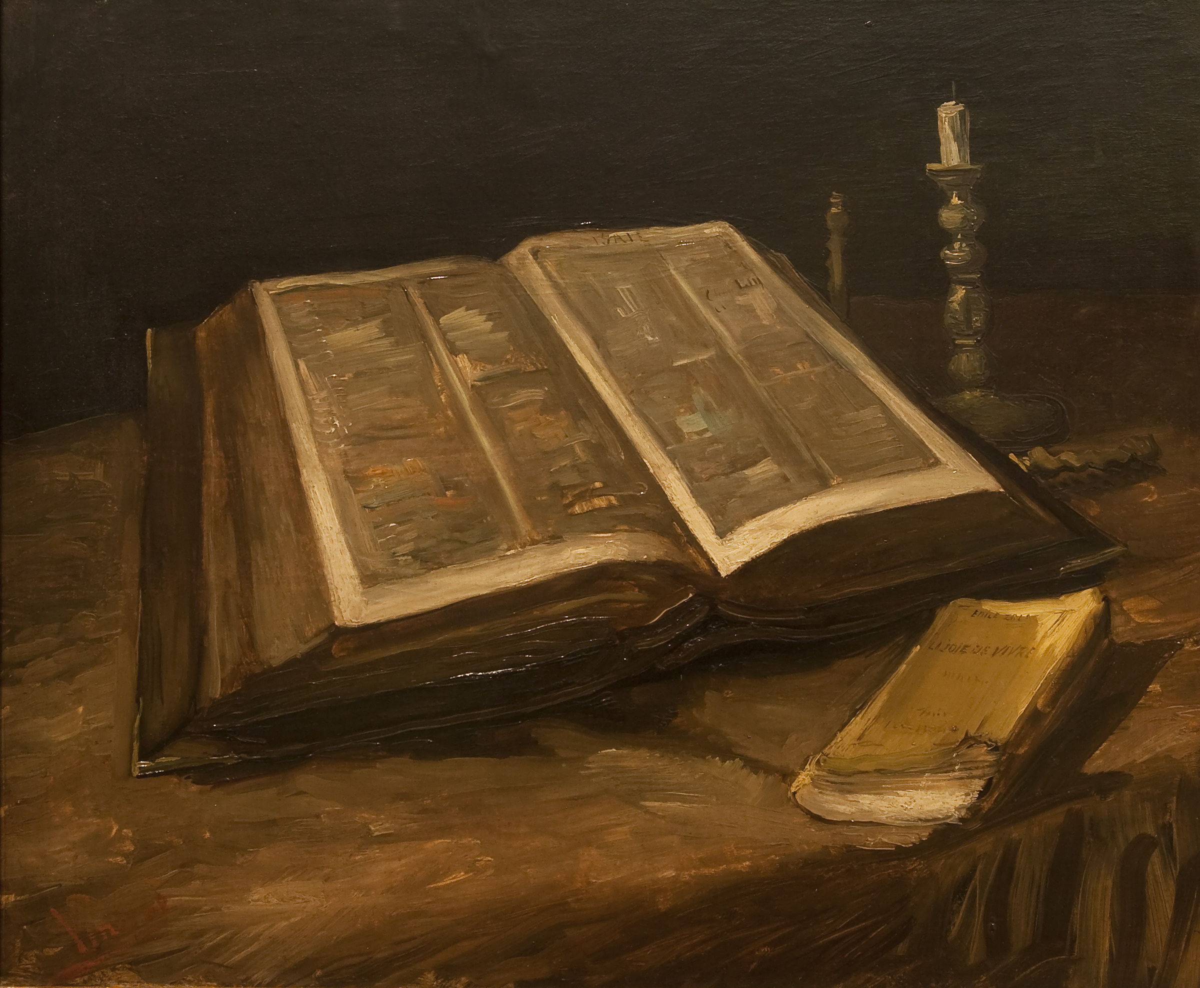 Stilleven met bijbel Vincent van Gogh 1885